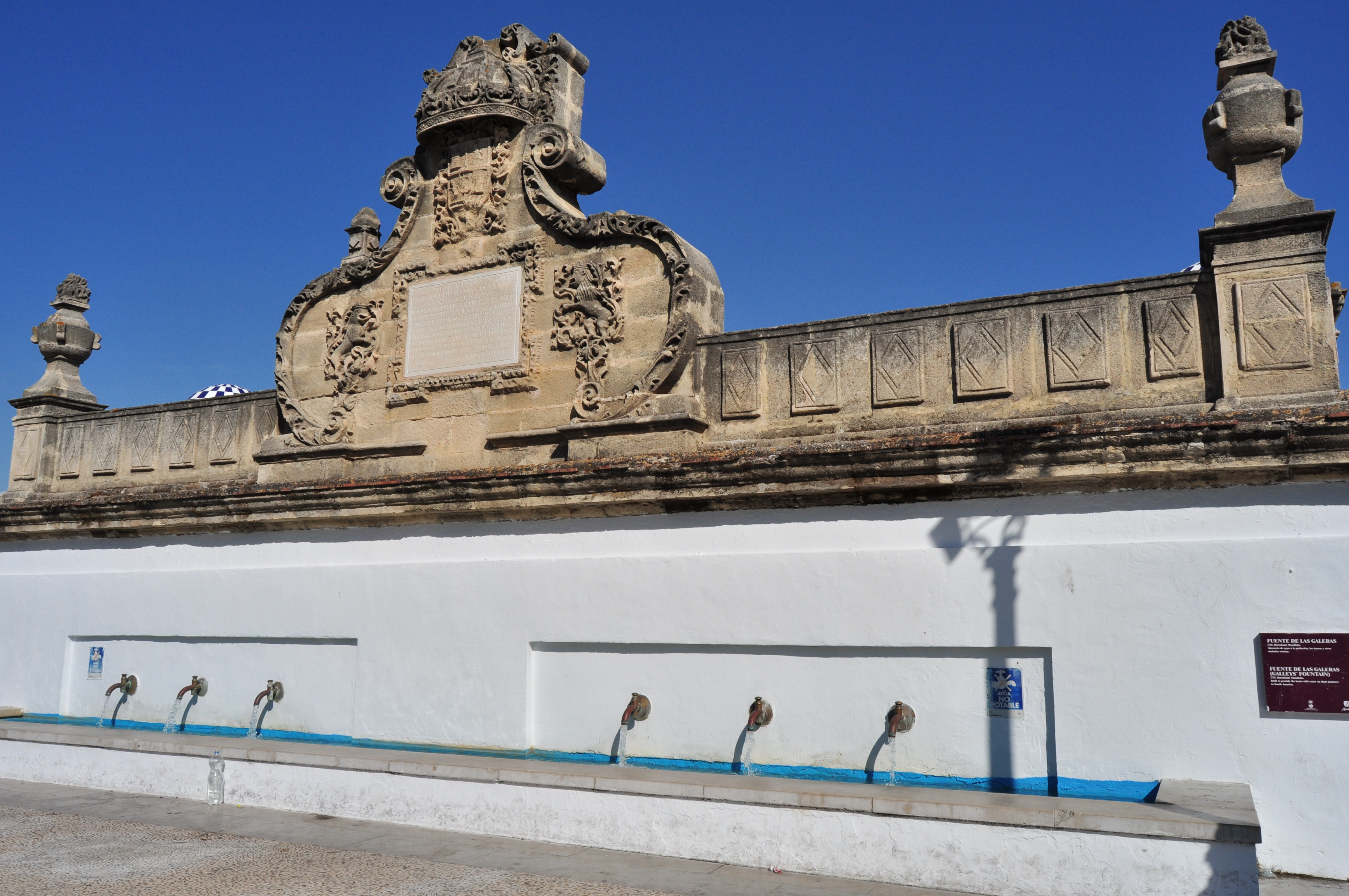 El Puerto de Santa Maria - 029